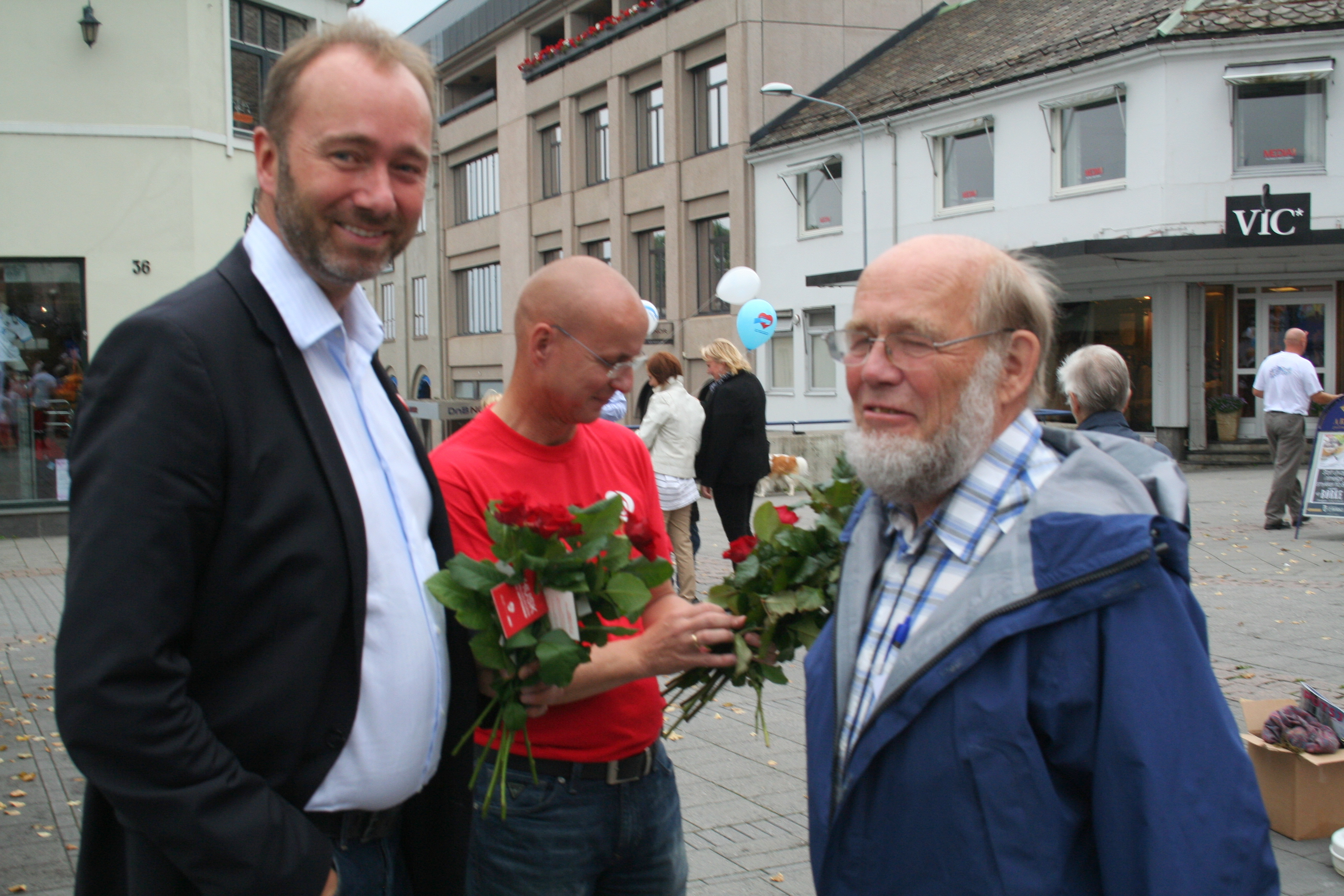 Trond Giske (Ap) diskuterer med Per Flatberg (Nord-Trøndelag) på Naturvernforbundets miljøtorg på Hamar.